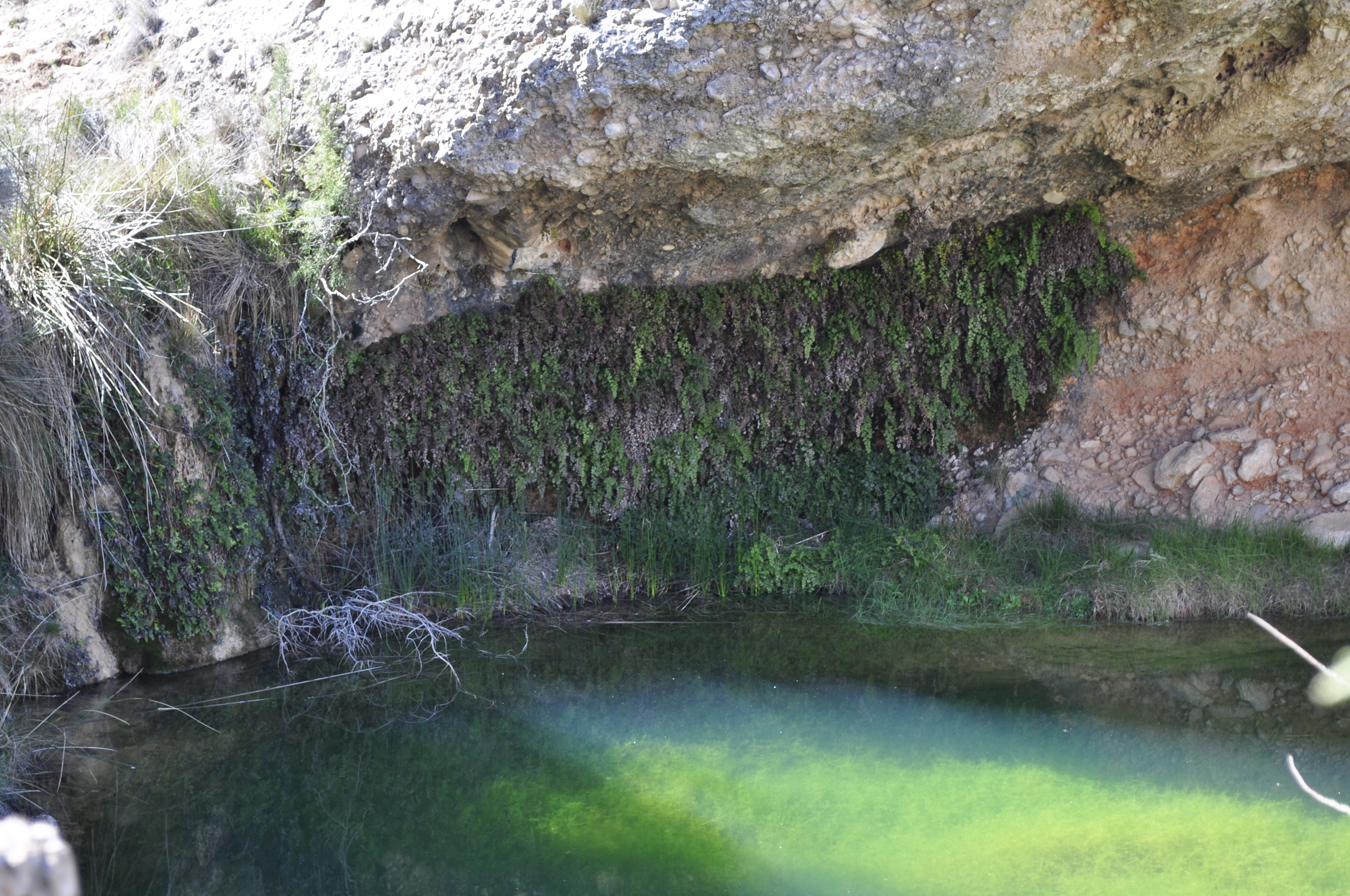 Es un nacimiento de agua, ubicado en el Barranco del Hocino, en el municipio de Casas de Ves (Albacete)